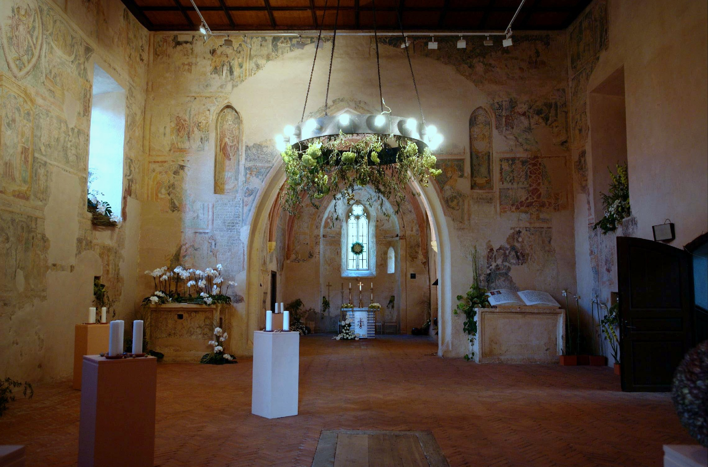 TURNIŠČE - Toronyhely, a régi templom szentélye